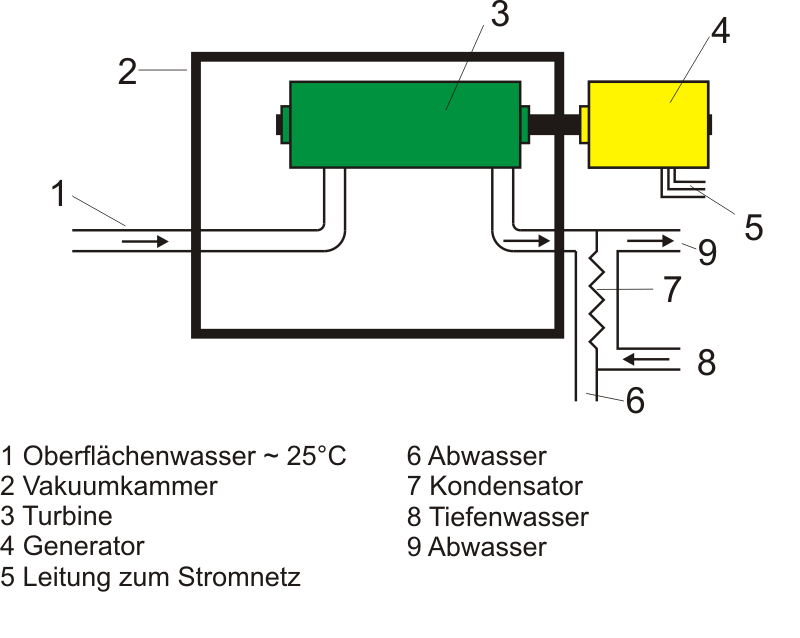 Schema eines offenen Meereswärmekraftwerk; selbst gezeichnet